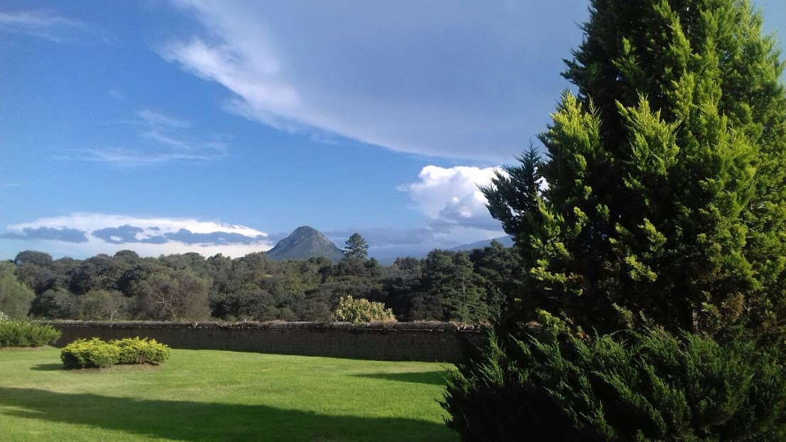 El SUAyED UNAM Tlaxcala cuenta con amplias áreas verdes